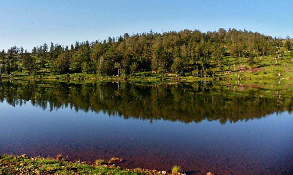 Lura, Diber